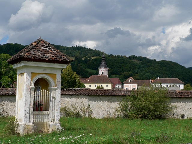 Stična Abbey